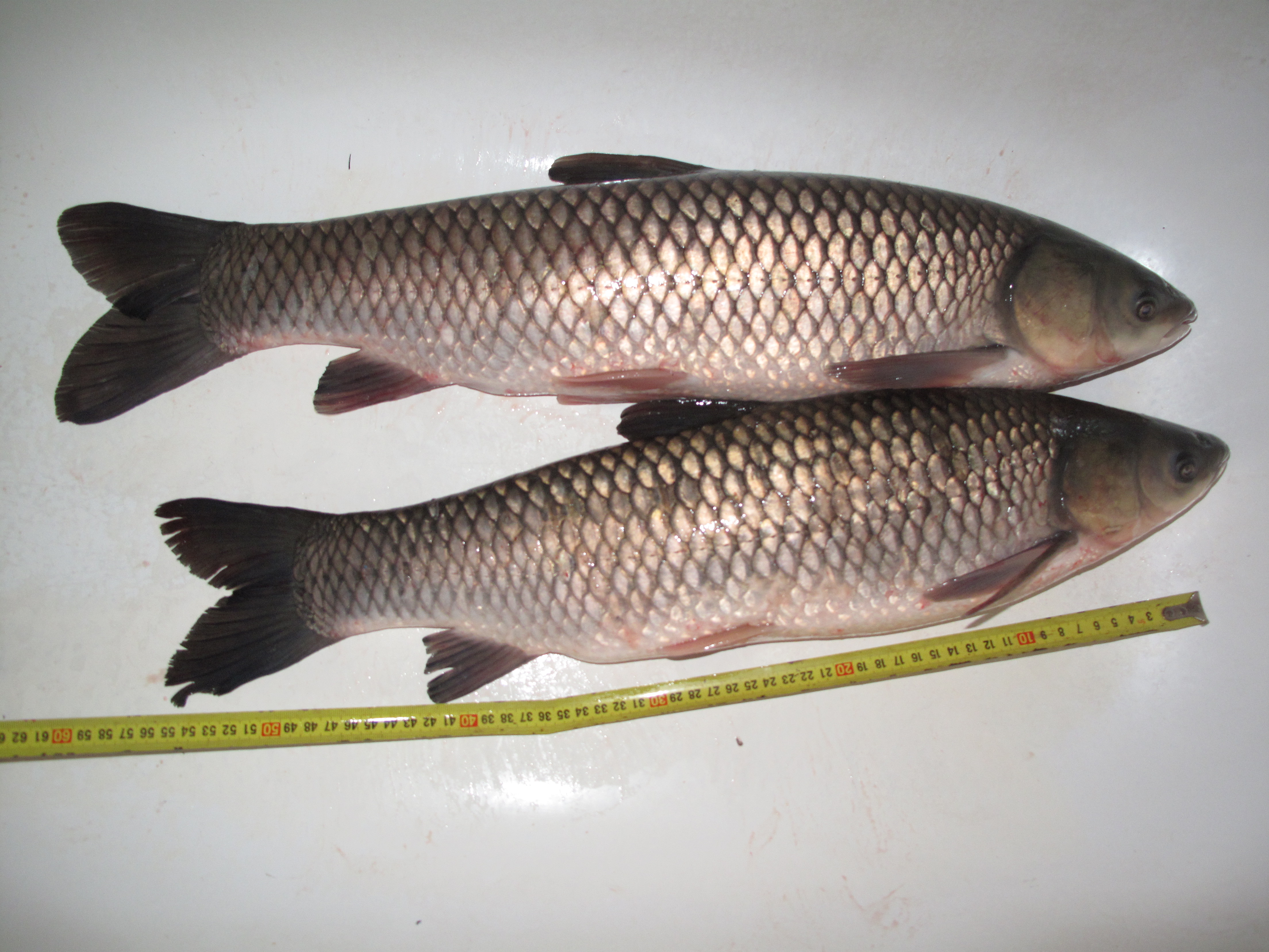 Amur bílý, větší vážil podle prodejce 2,70 kg, menší 2,20 kg. Menší byl samec a měřil cca 60 cm.